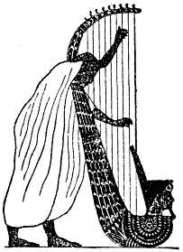 Fornegyptisk harpspelare